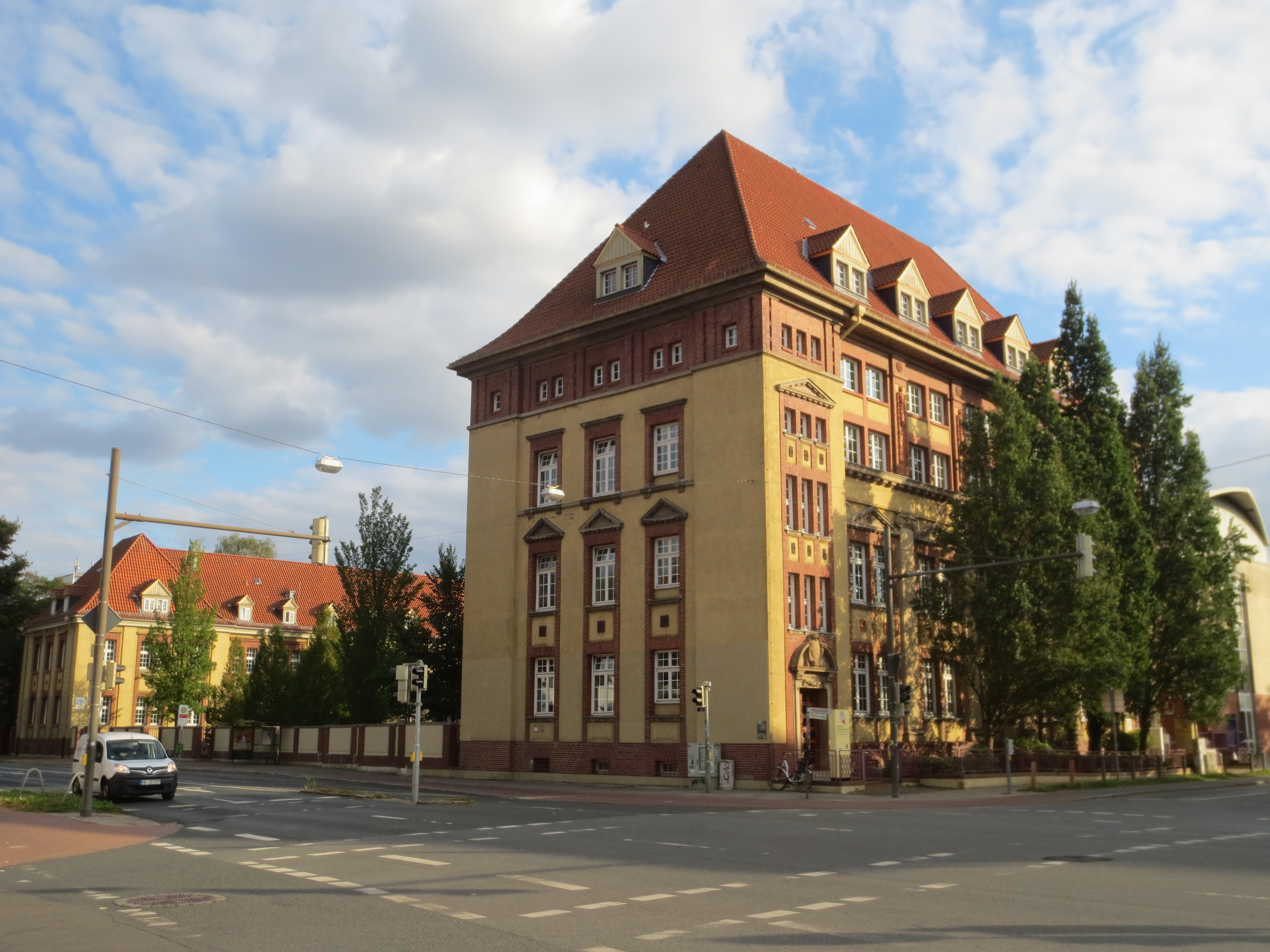 Fernsprechamt "Hansa" in Bremen, Friedrich-Karl-Straße 55Die Gesamtanlage ist ein geschütztes Kulturdenkmal in der Freien Hansestadt Bremen, mit der Nr. 1754 beim Landesamt für Denkmalpflege registriert.